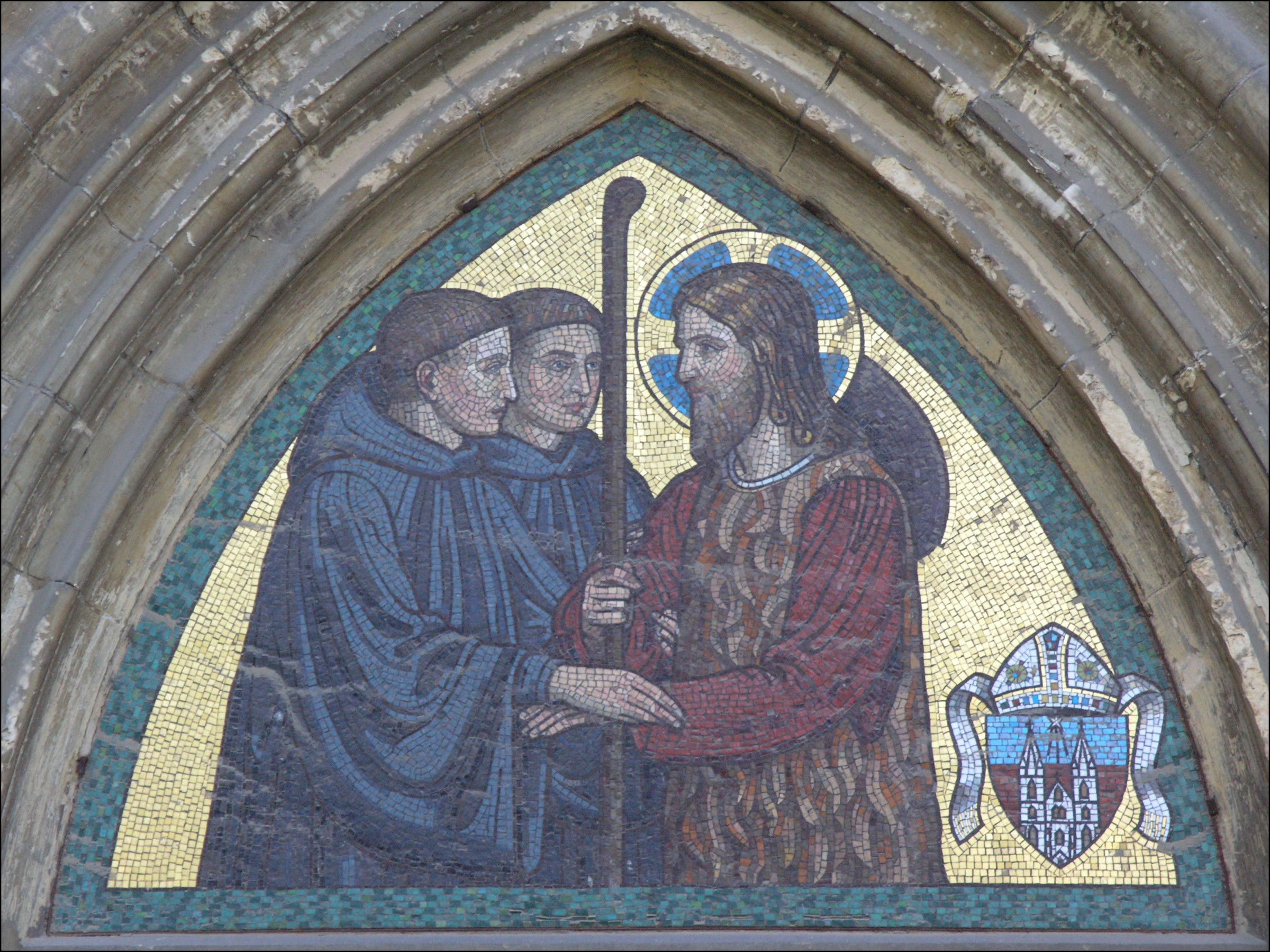 Viktor Foerster, mozaika Kristus provázený dvěma benediktinskými mnichy, Praha, Nové Město - kostel Panny Marie na Slovanech